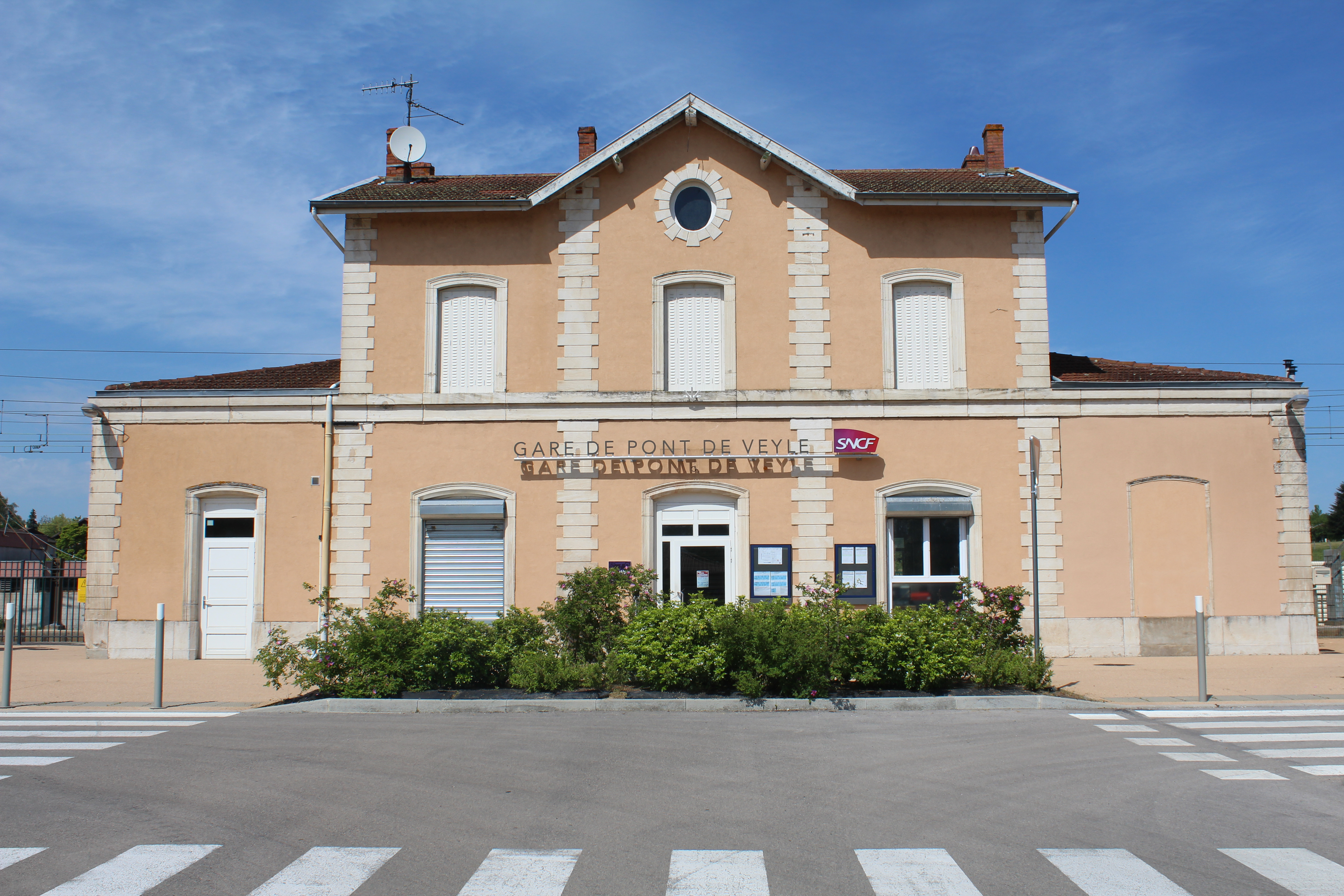 Gare de Pont-de-Veyle dans la commune de Crottet.